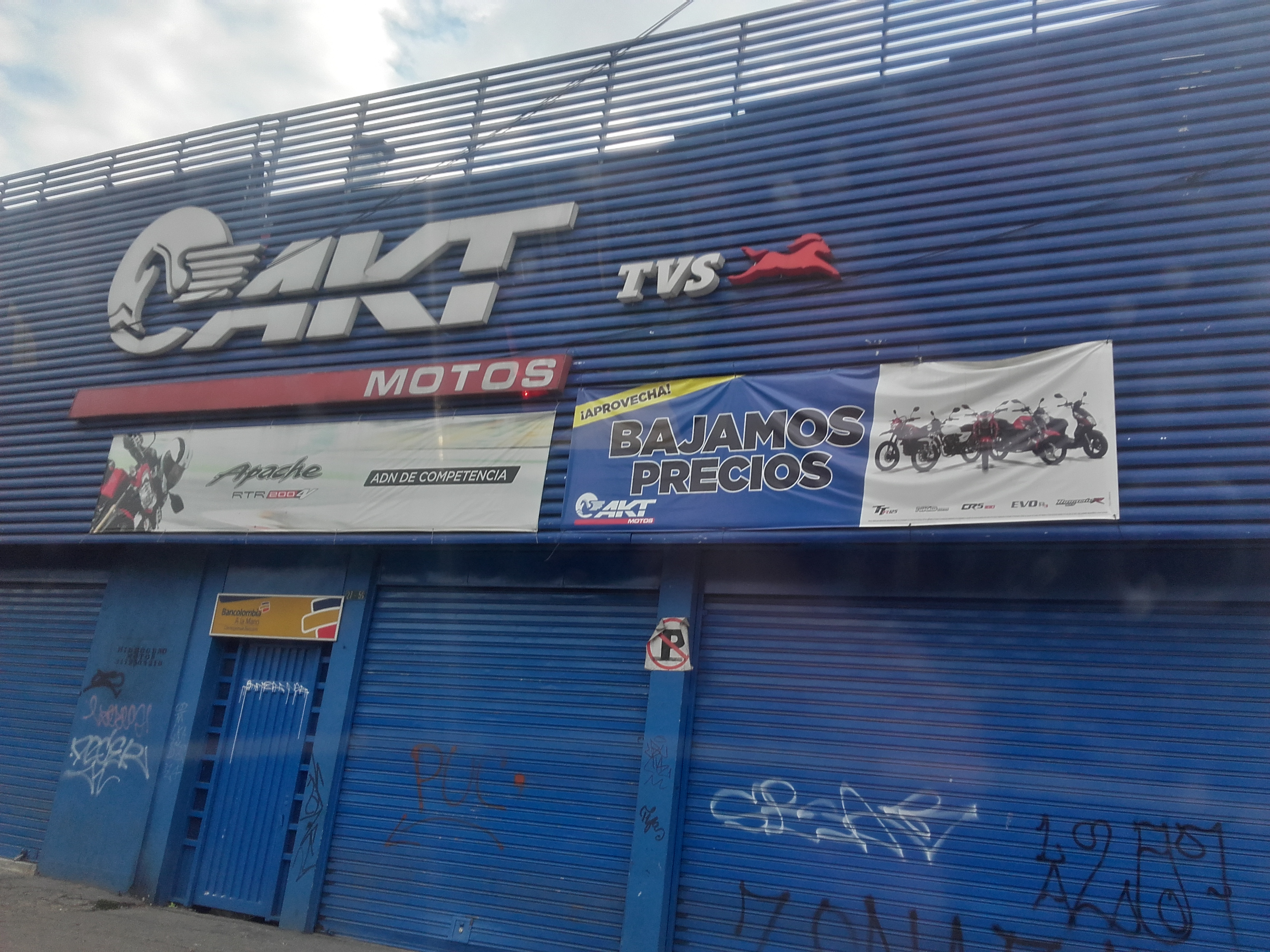 dndndnfnnfnf